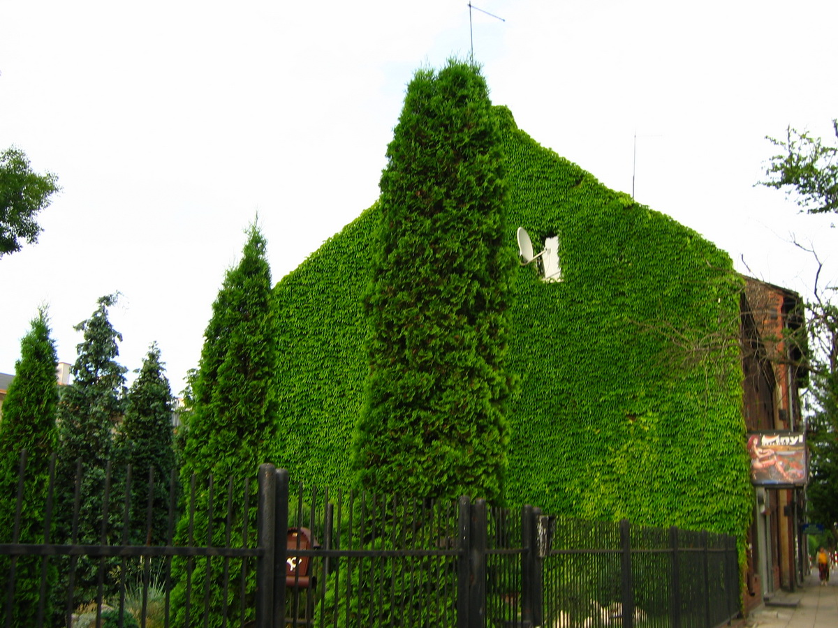 Budynek porośnięty winobluszczem trójklapowym na ul.Dąbrowskiego w Dąbrowie Górniczej